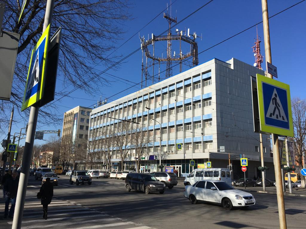 Улица Кирова 47 - 49, Владикавказ, Северная Осетия